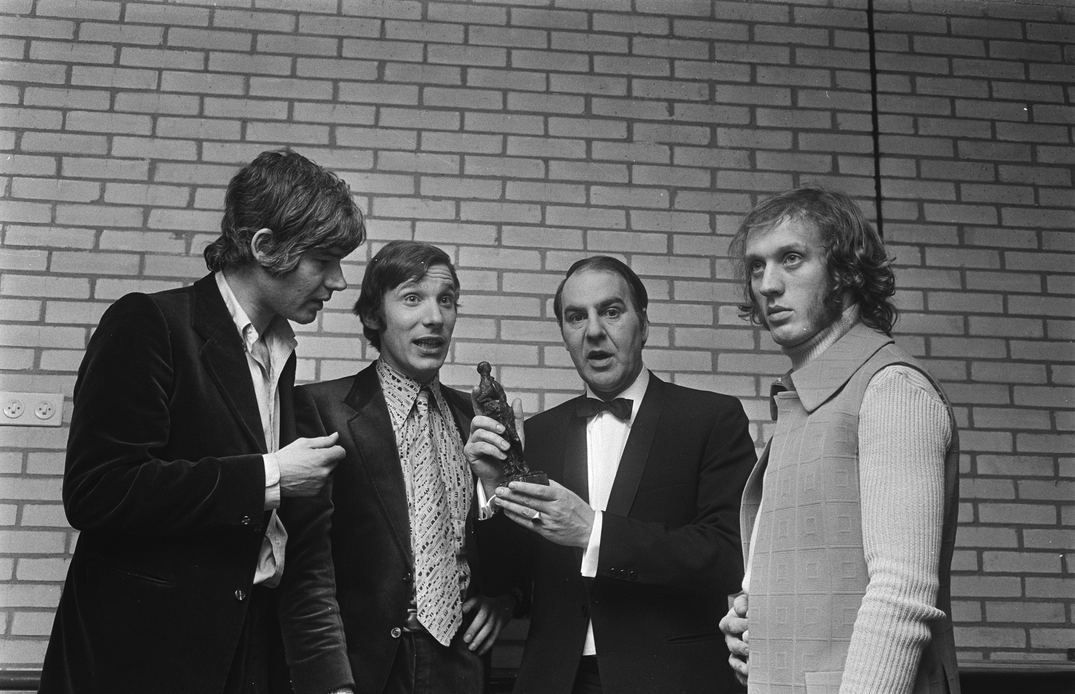 Collectie / Archief : Fotocollectie Anefo Reportage / Serie : [ onbekend ] Beschrijving : Willem Duys reikt Edisons uit in TV-programma "Voor de vuist weg", v.l.n.r. Paul van Vliet, Frans Halsema, Willem Duys, Herman van Veen Datum : 26 februari 1971 Trefwoorden : cabaretiers, prijsuitreikingen, programmamakers, zangers Persoonsnaam : Duys, Willem, Halsema, Frans, Veen, Herman van, Vliet, Paul van Fotograaf : Verhoeff, Bert / Anefo Auteursrechthebbende : Nationaal Archief Materiaalsoort : Negatief (zwart/wit) Nummer archiefinventaris : bekijk toegang 2.24.01.05 Bestanddeelnummer : 924-3063